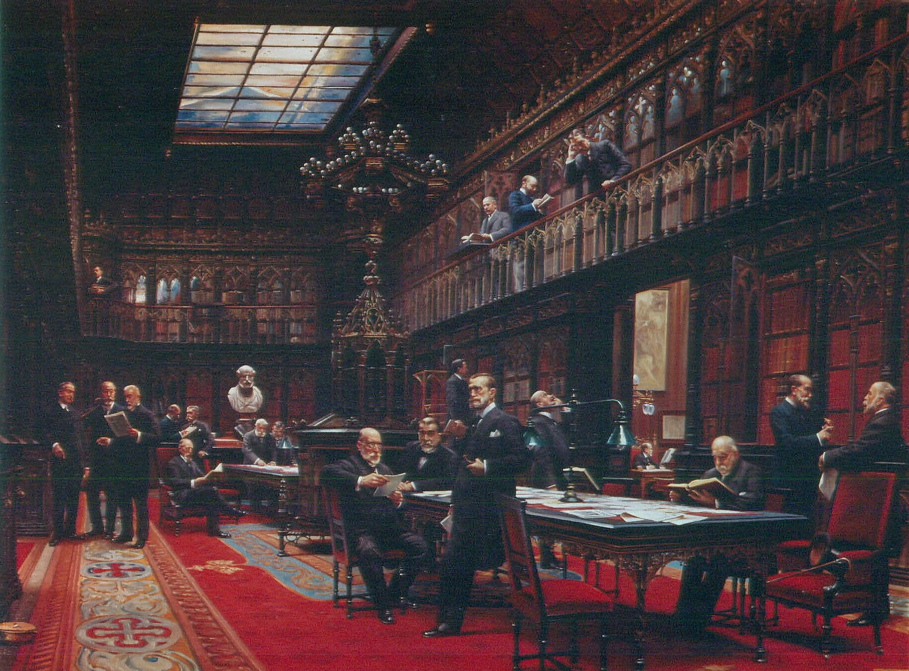 El lienzo representa el Salón de lectura de la Biblioteca del Palacio del Senado de España en febrero de 1917, durante el reinado de Alfonso XIII.